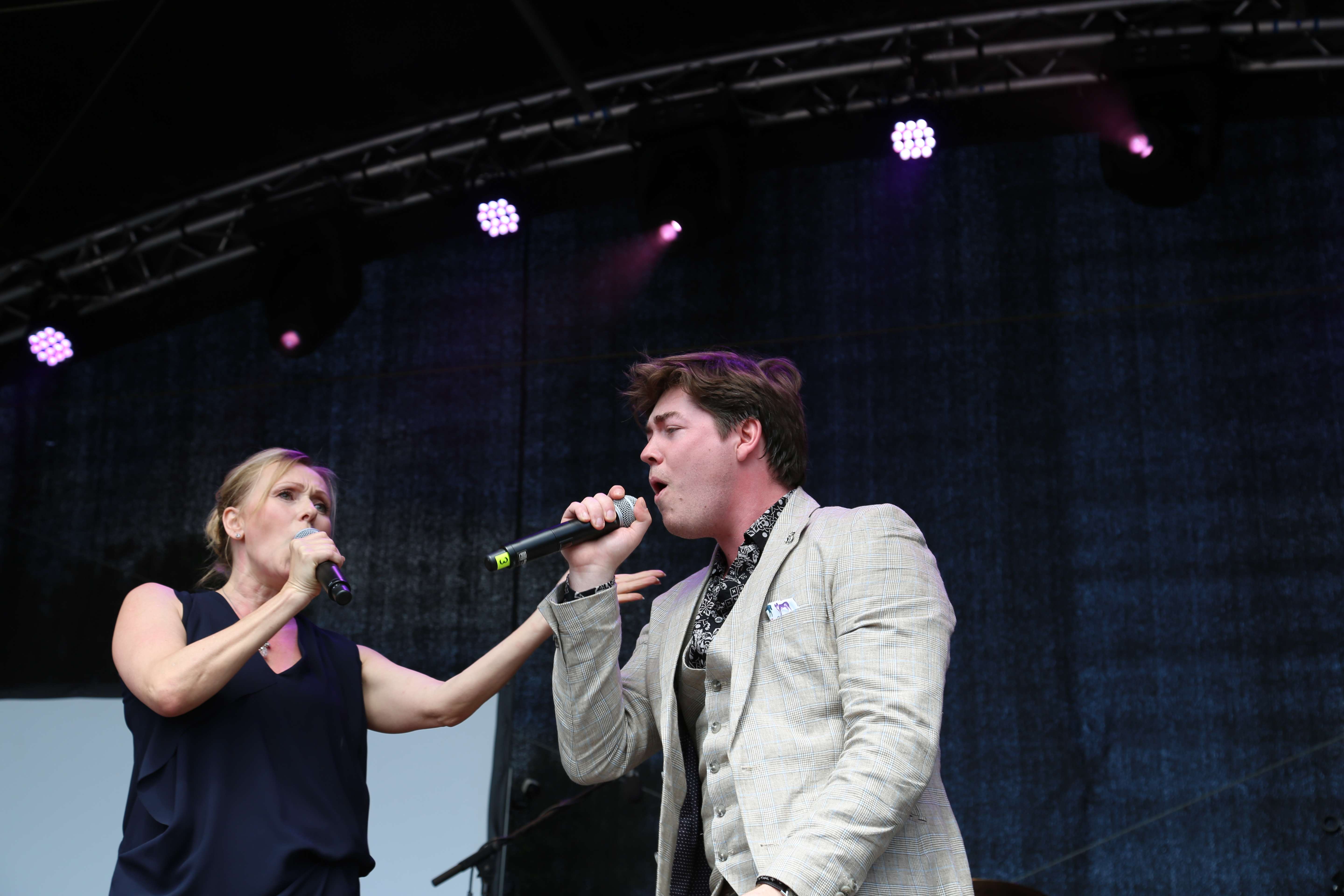 Dana Golombek und Frederic Böhle singen beim "Rote Rosen"-Fantag 2017, am 18.06.2017 in Lüneburg.